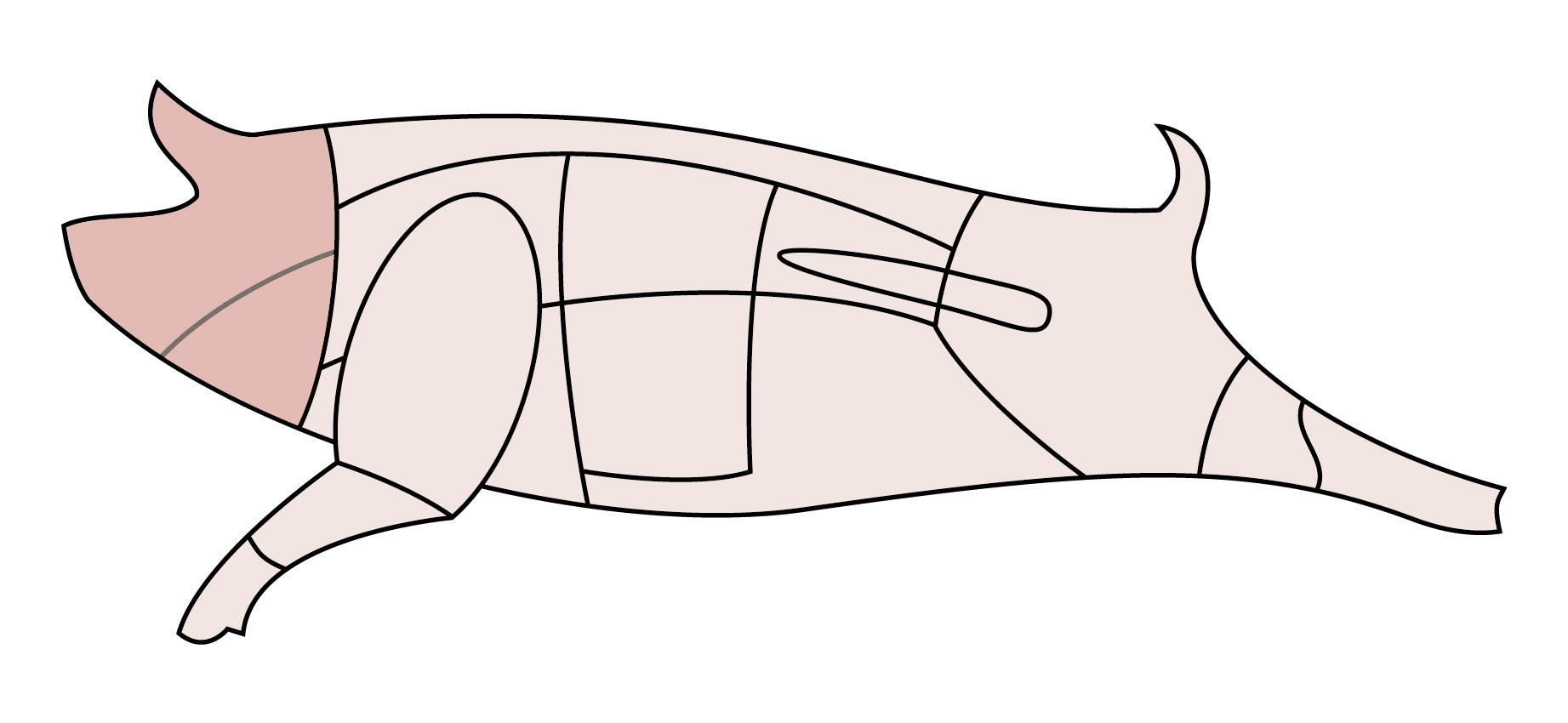 Schematische Darstellung eines Schweins, Schweinskopf.